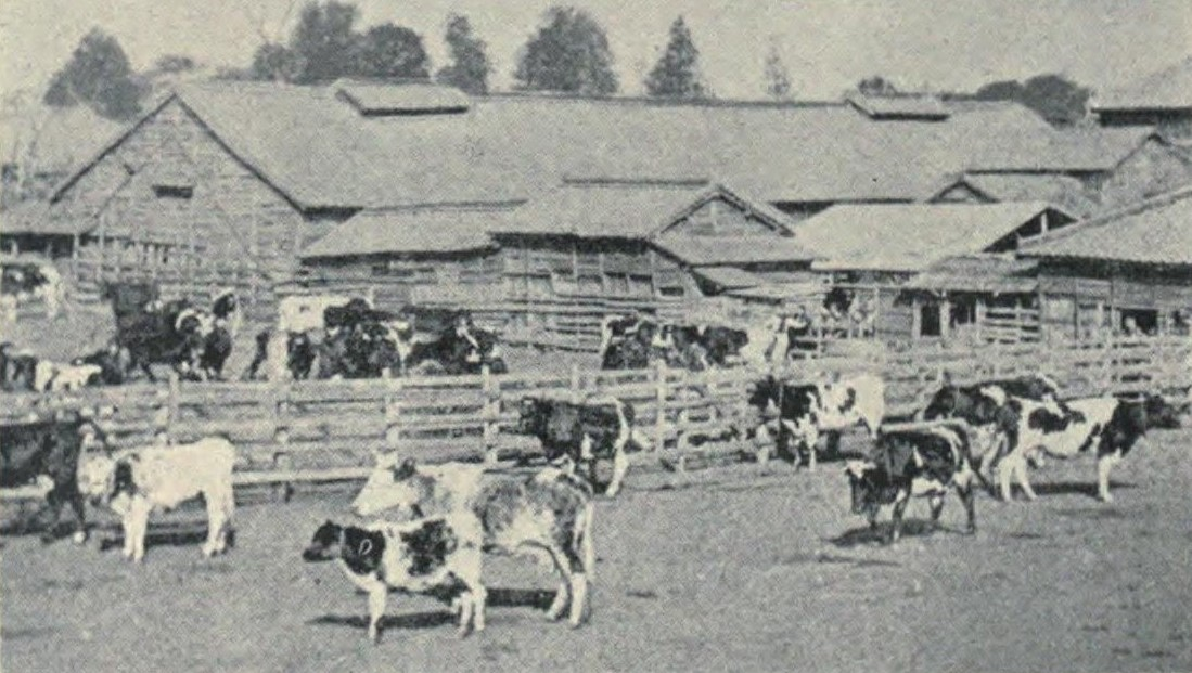 牧田義雄の牛乳搾取業楽牛園 駒込林町 現・文京区千駄木5